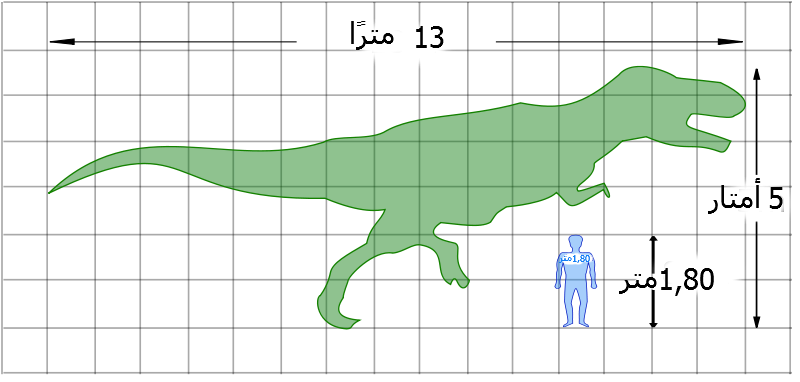 مُقارنة بين حجم التيرانوصور والإنسان.